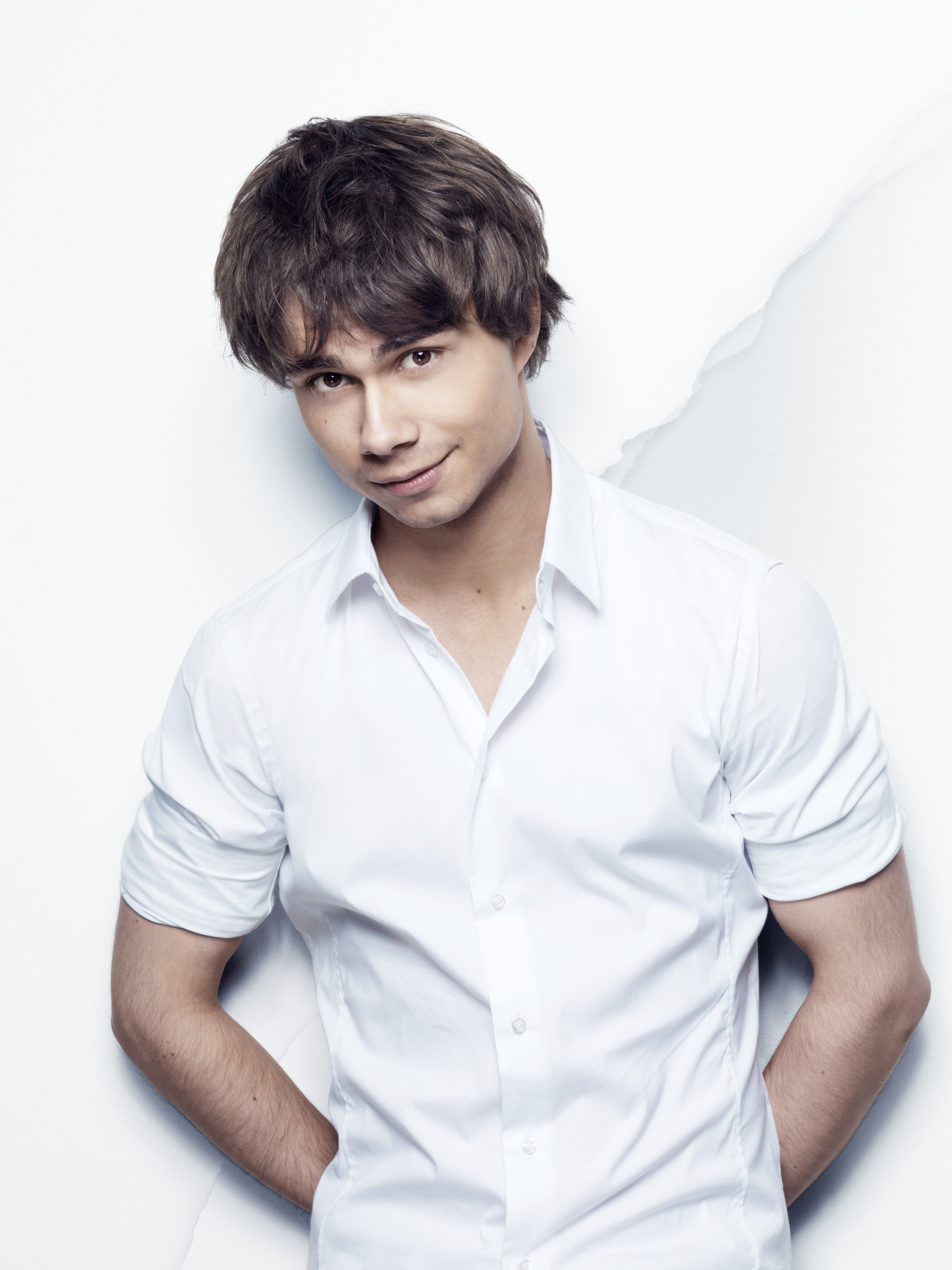 Artisten Alexander Rybak.